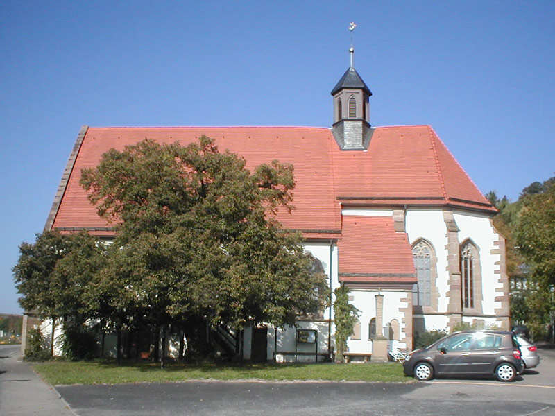 Evangelische St.-Anna-Kirche in Beilstein (Baden-Württemberg), Deutschland